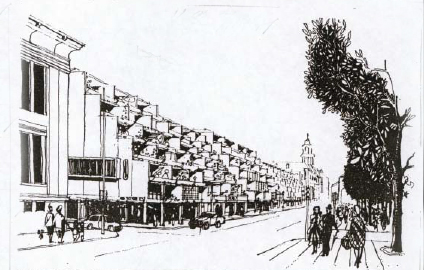 Skisseforslag fra ingeniør Olav Selvaag til terrasseblokker i Karl Johan-kvartalet (vis-a-vis Studenterlunden), gjengitt i artikkelen «Hengende hager langs Karl Johan»